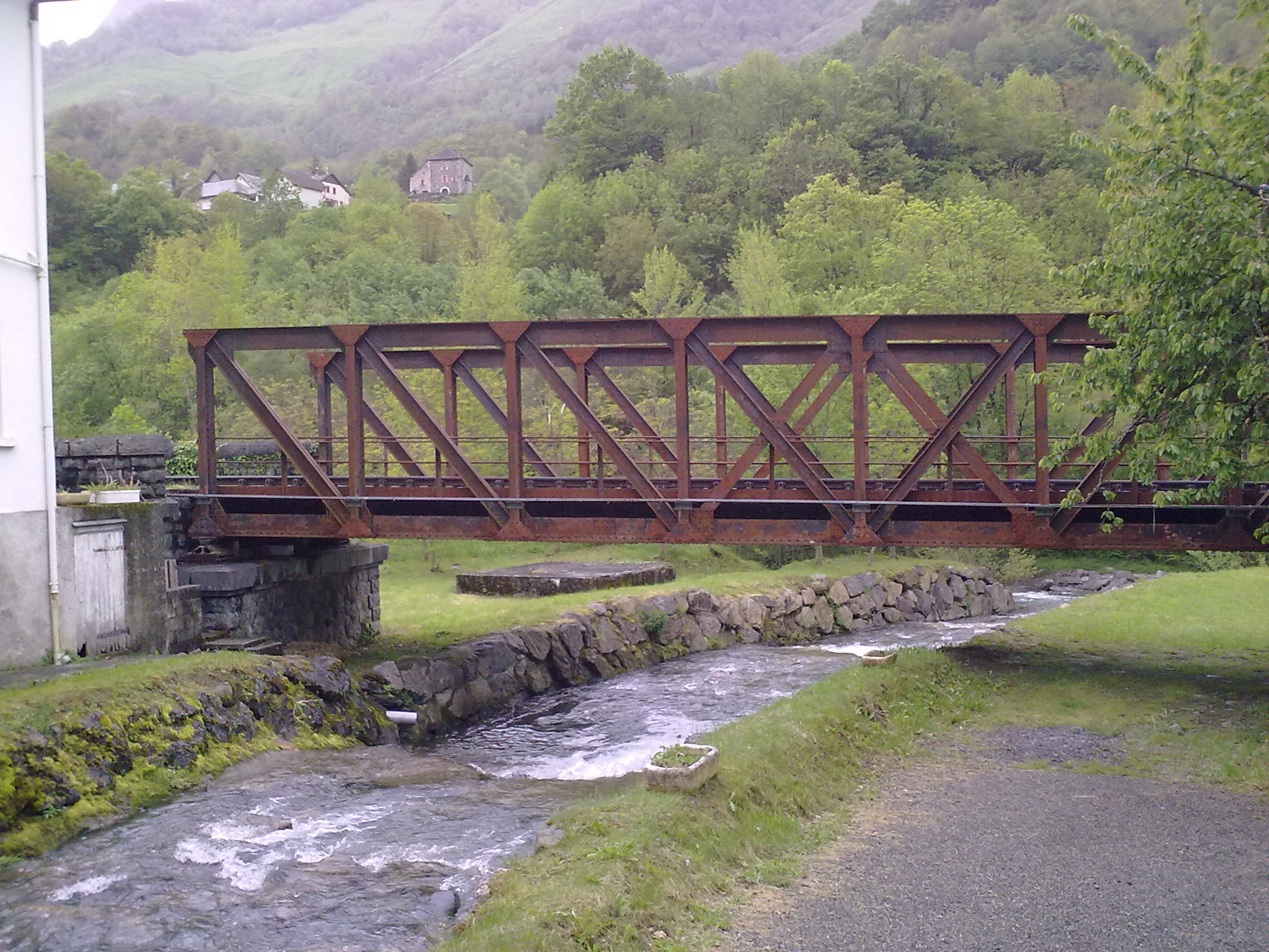 Etsaut (Pyrénées-Atlantiques, France) - Pont abandonné sur la Ligne Pau - Canfranc.